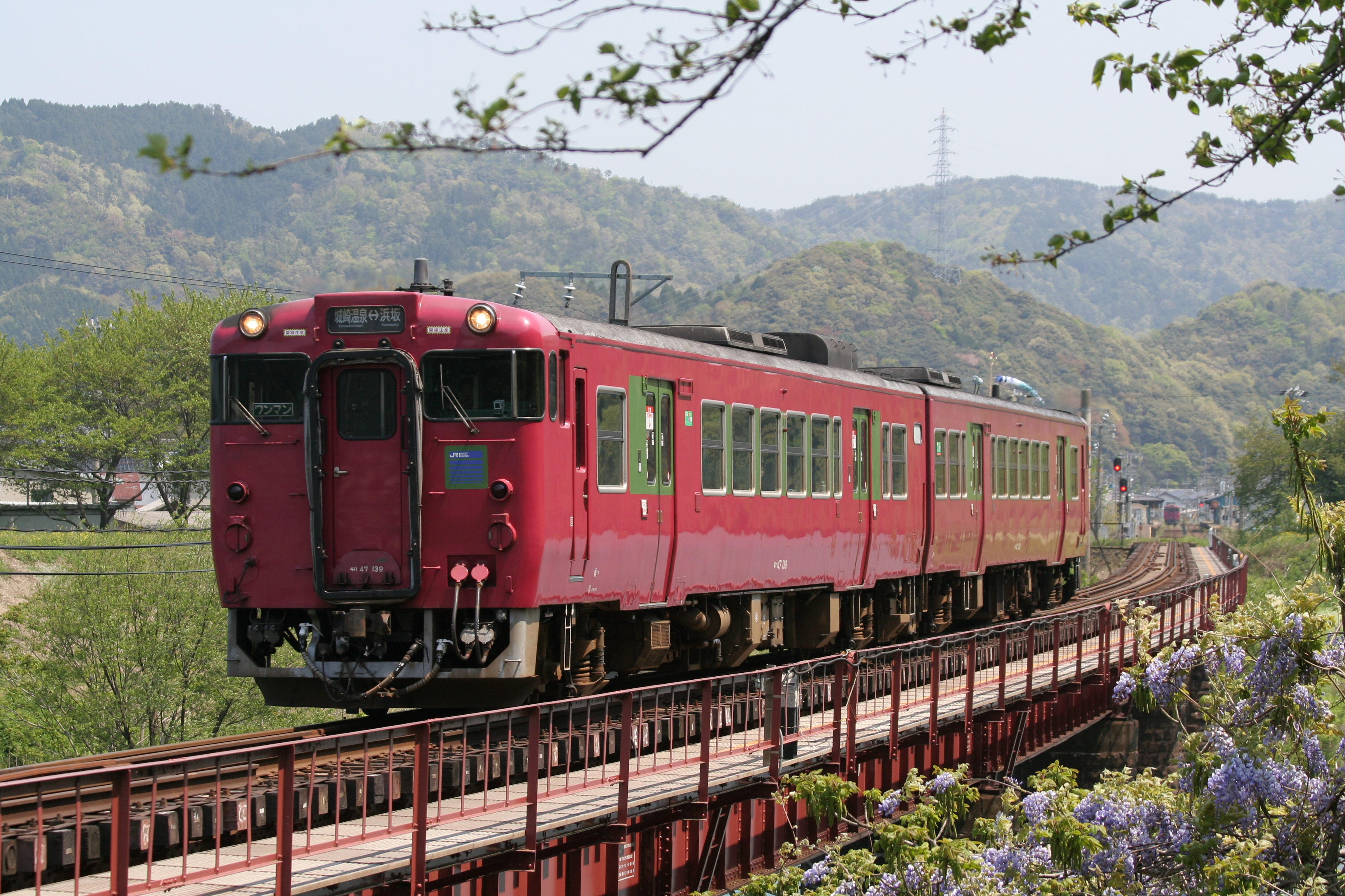 JR西日本キハ40系気動車 キハ47-139 山陰本線、香住 - 鎧